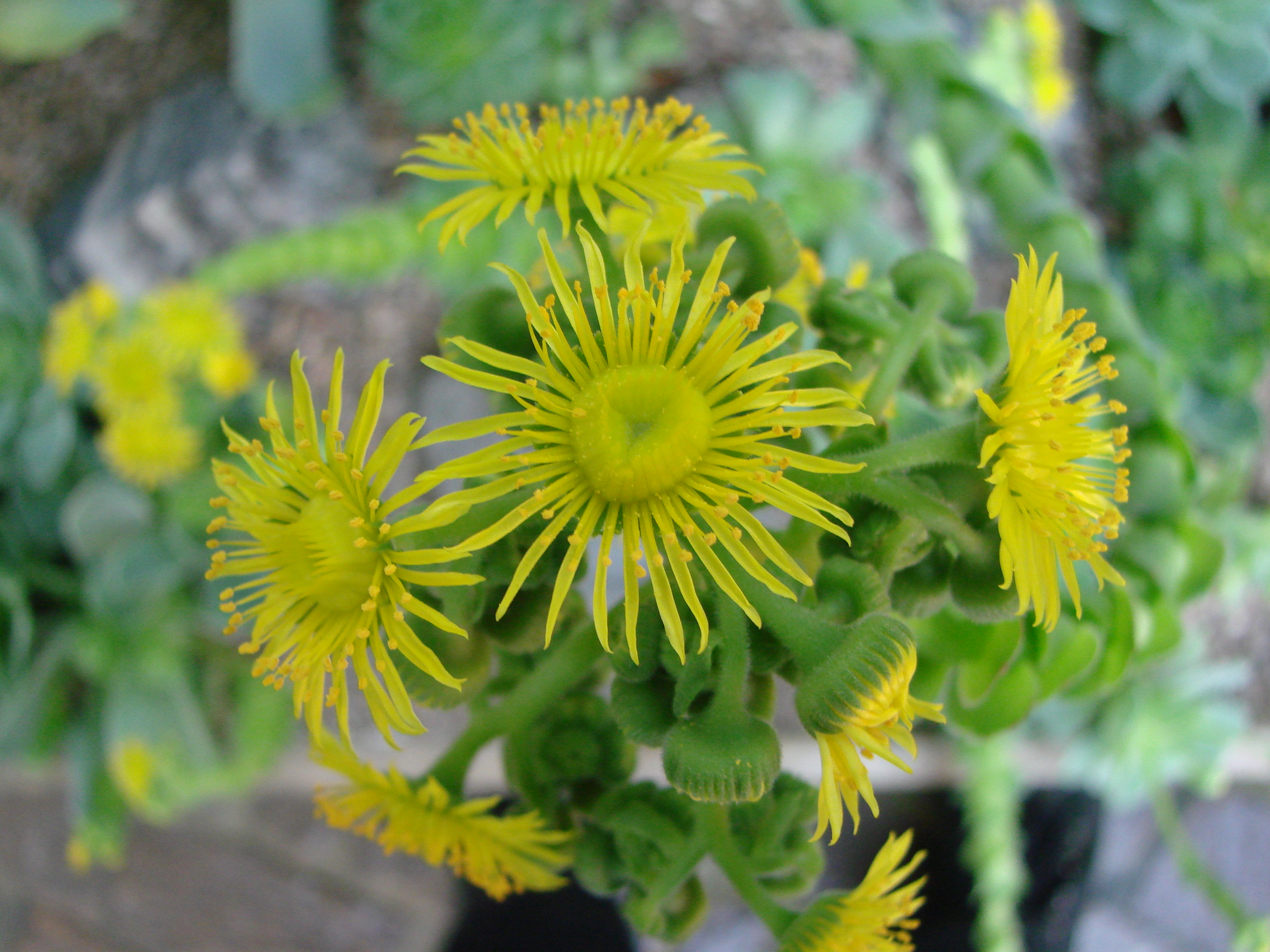 Jardin botanique de l'Université de Zurich (Suisse) : Greenovia dodrantalis (Willd.) Webb & Berth